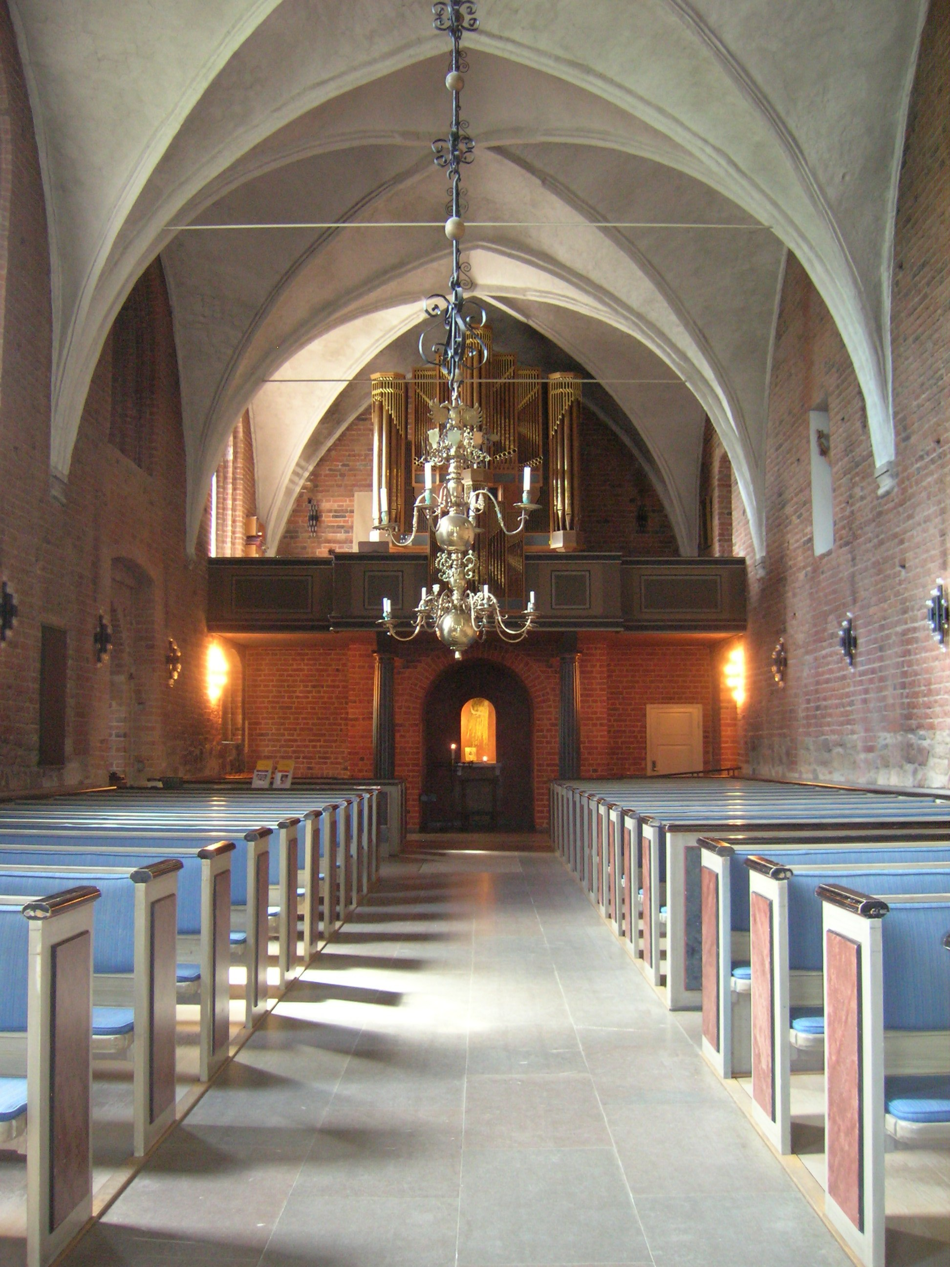 Sankt Peters Klosters kyrka in Lund, Skåne, Sweden.